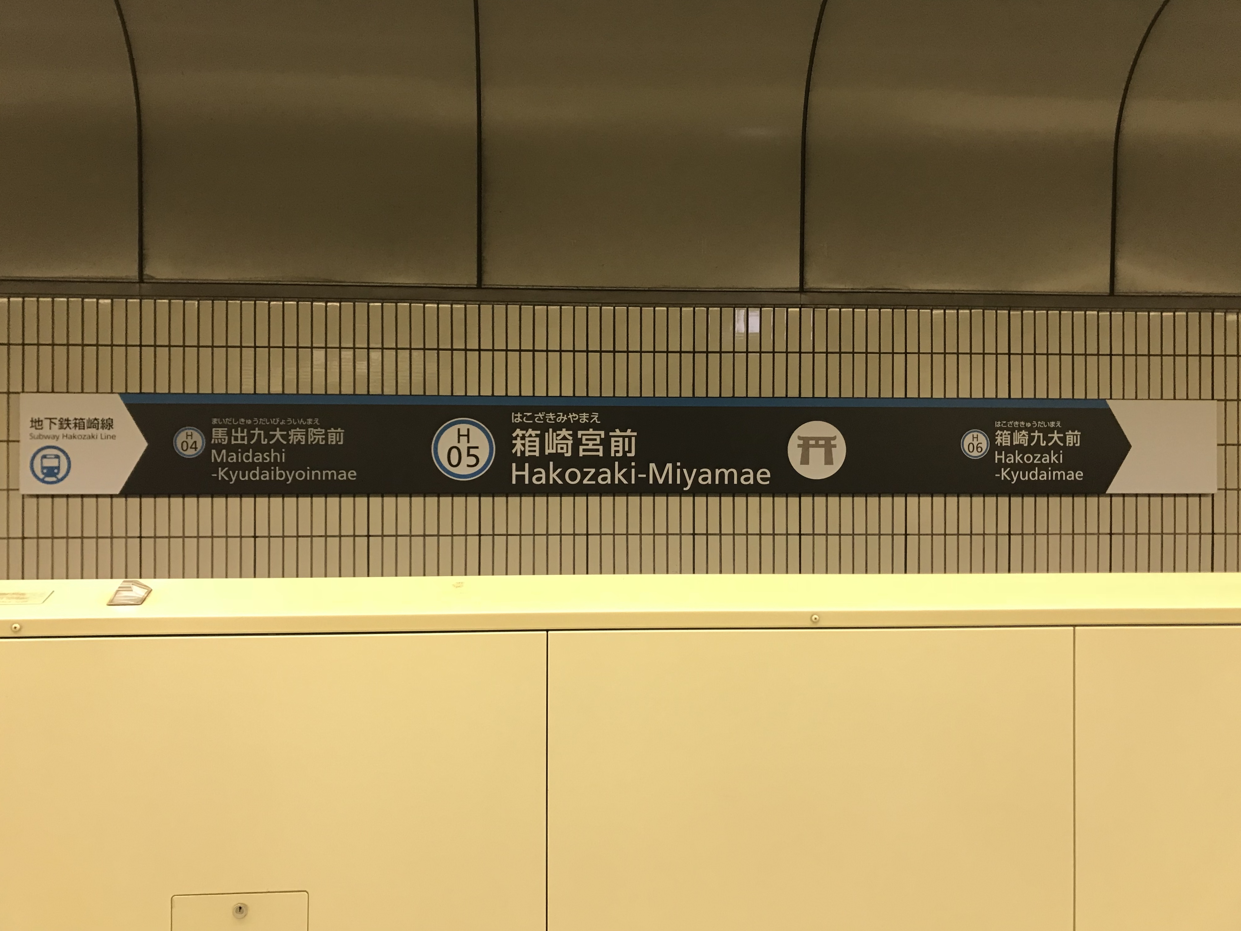 箱崎宮前駅の駅名標。イラストは筥崎宮の大鳥居